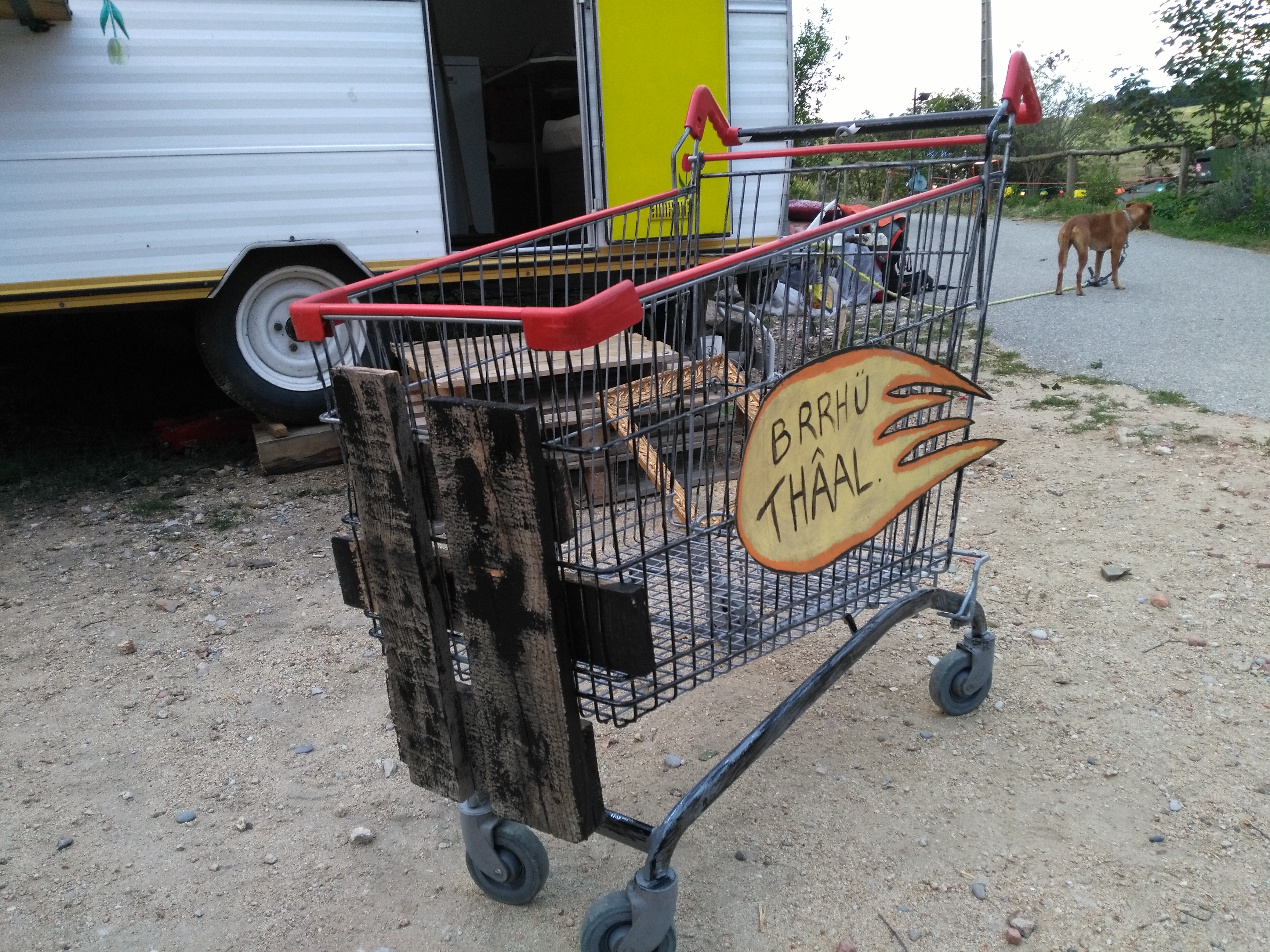 Le brutal caddie est le sport non-officiel des nuits du Hellfest, et probablement d'autres festivals. Il s'agit de joute dans des caddies. Ce caddie a été renforcé et personnalisé à l'occasion d'un mariage.